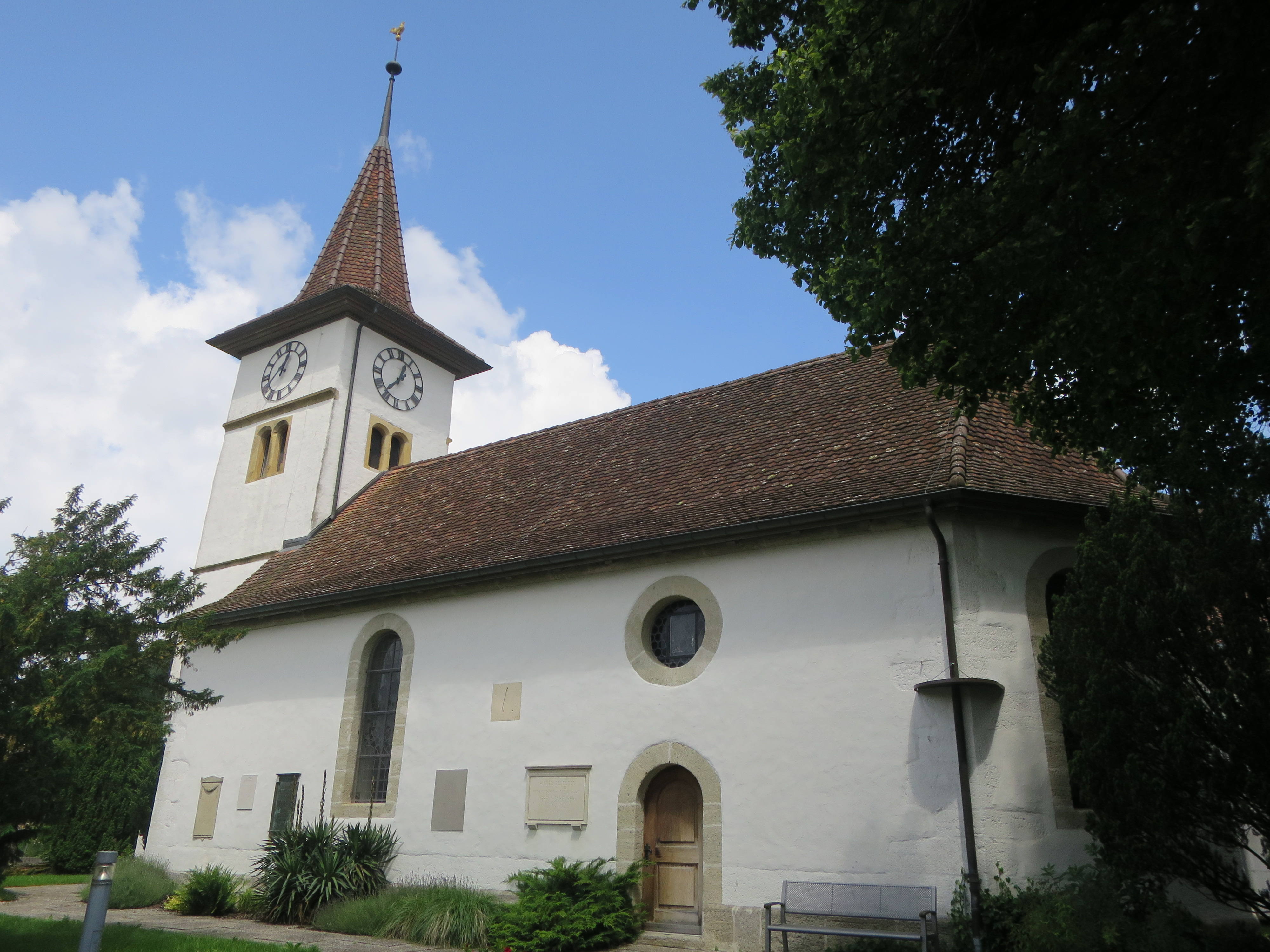 Reformierte Kirche Gampelen, Schweiz, von aussen